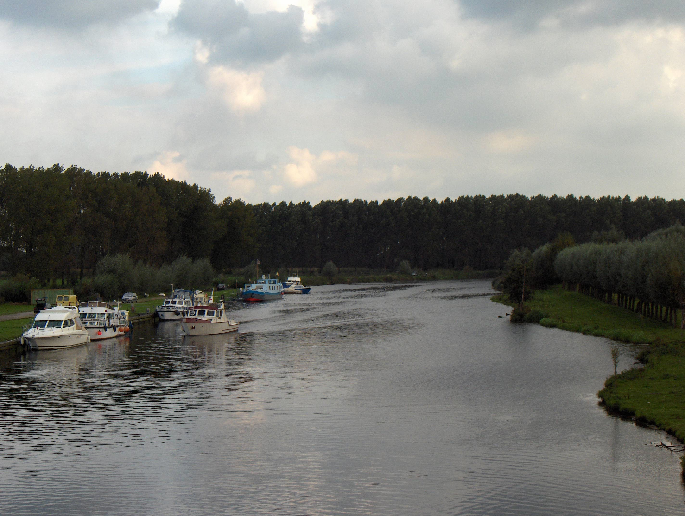 Beschreibung: Gent (Belgien), Ortsteil Mendonk (1965 eingemeindet), Moervaart, Blick von der Spanjeveer-Brücke ostwärts. Fotograf: Friedrich Tellberg Datum: 25. September 2005